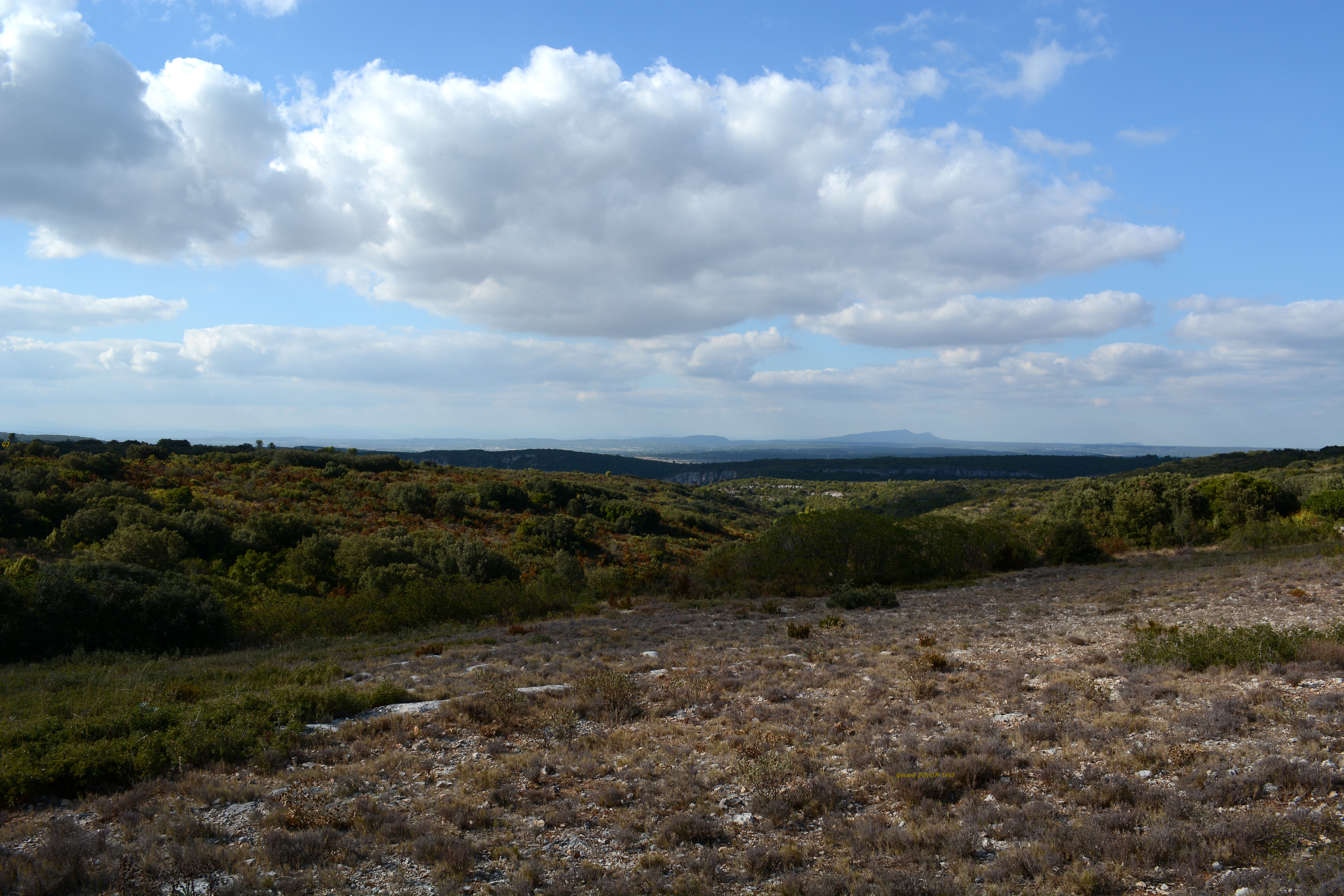 Nous nous trouvons au Nord du village,et apercevons en premier plan du thym, puis des garrigues basses .Les falaises des gorges du Gardon , le mont Bouquet , les contreforts des Cévennes au fond.